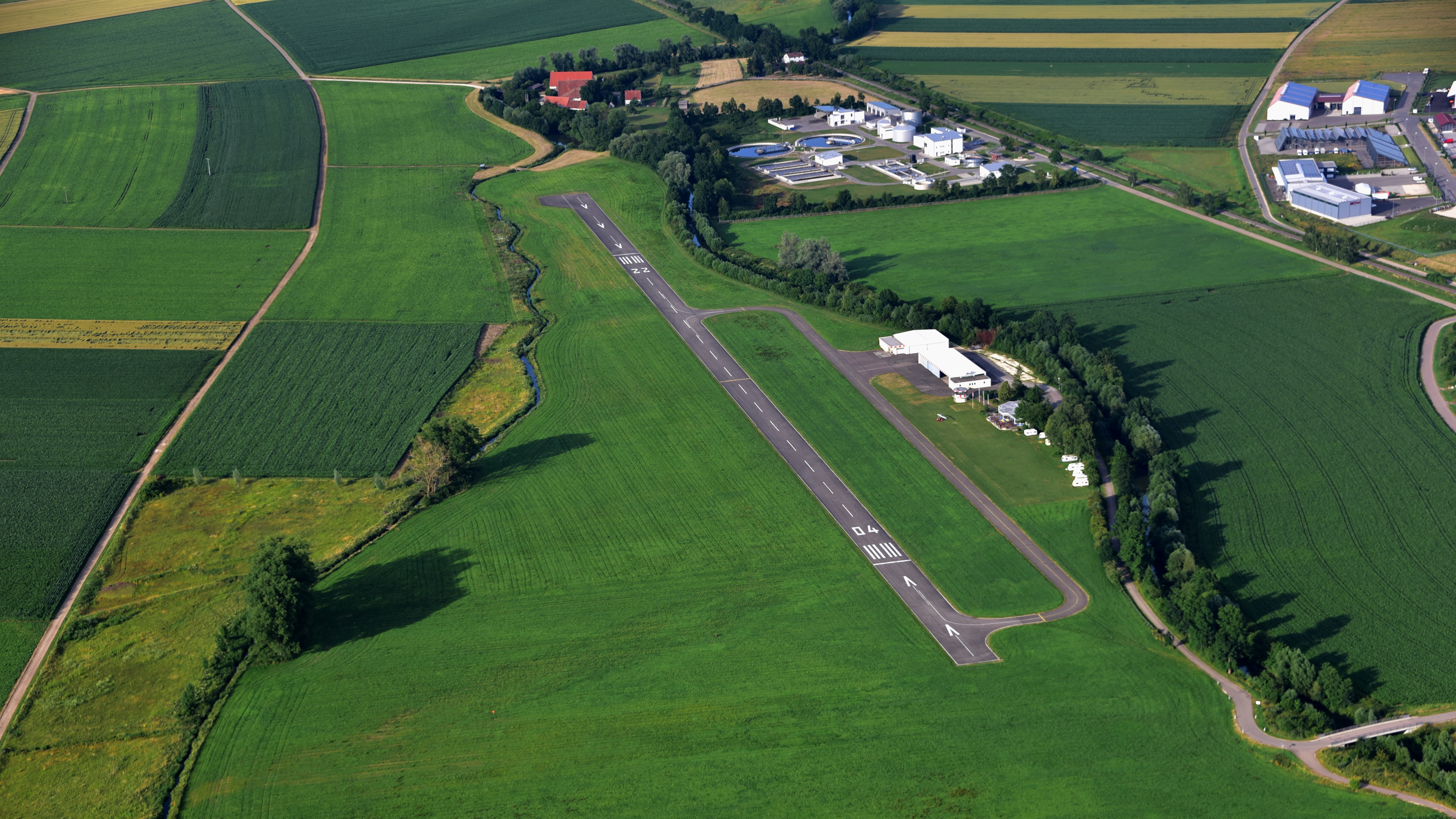 Nördlingen, Flugplatz, Luftaufnahme (2016)